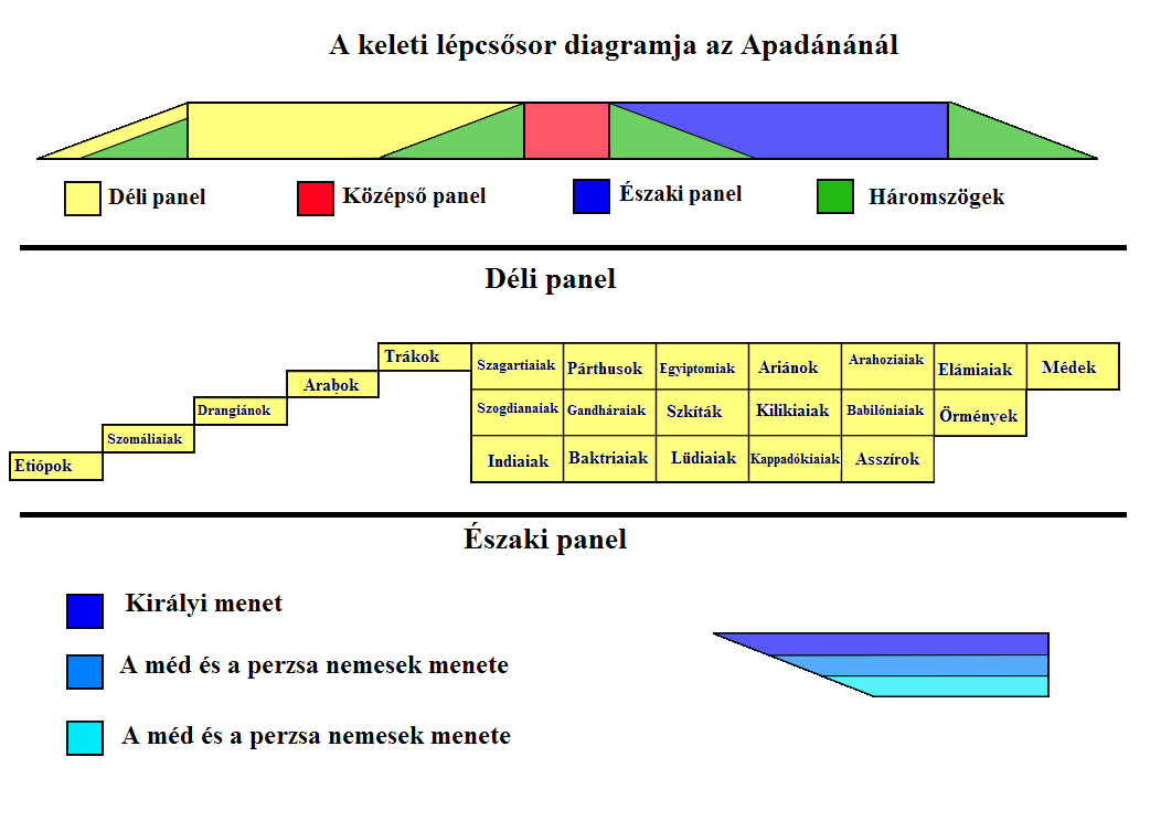 Az Apadána keleti lépcsősora